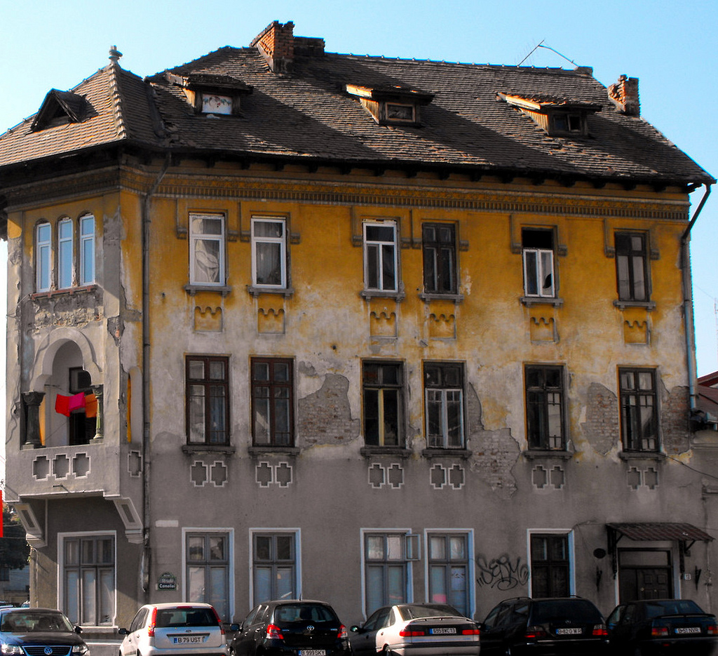 str.Cameliei 18